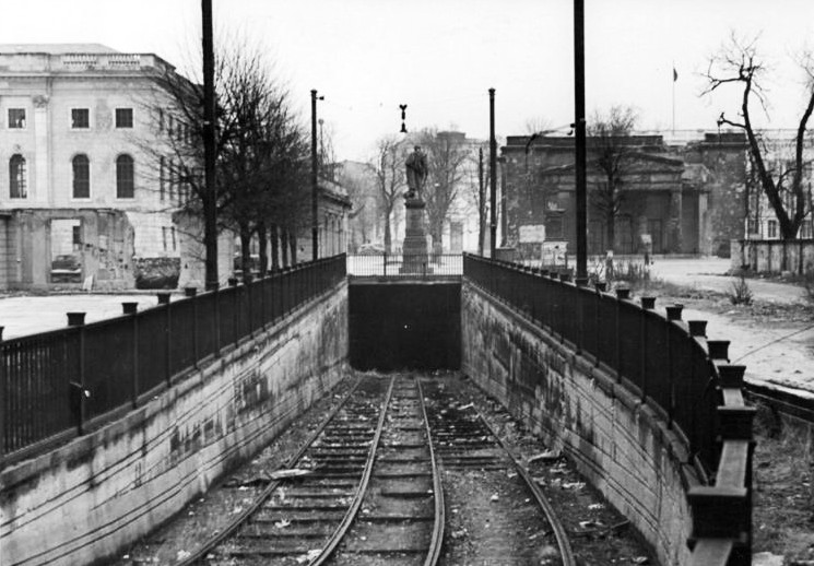 Der Linden-Tunnel, der von der Behrenstraße zur Dorotheenstraße geht, soll jetzt wieder aufgebaut und bis Pfingsten wieder in Betrieb genommen werden. Aufn.: Illus Funck 15.2.50 5412-50